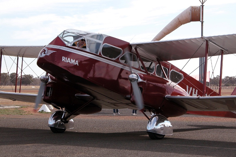 De Havilland Dragon